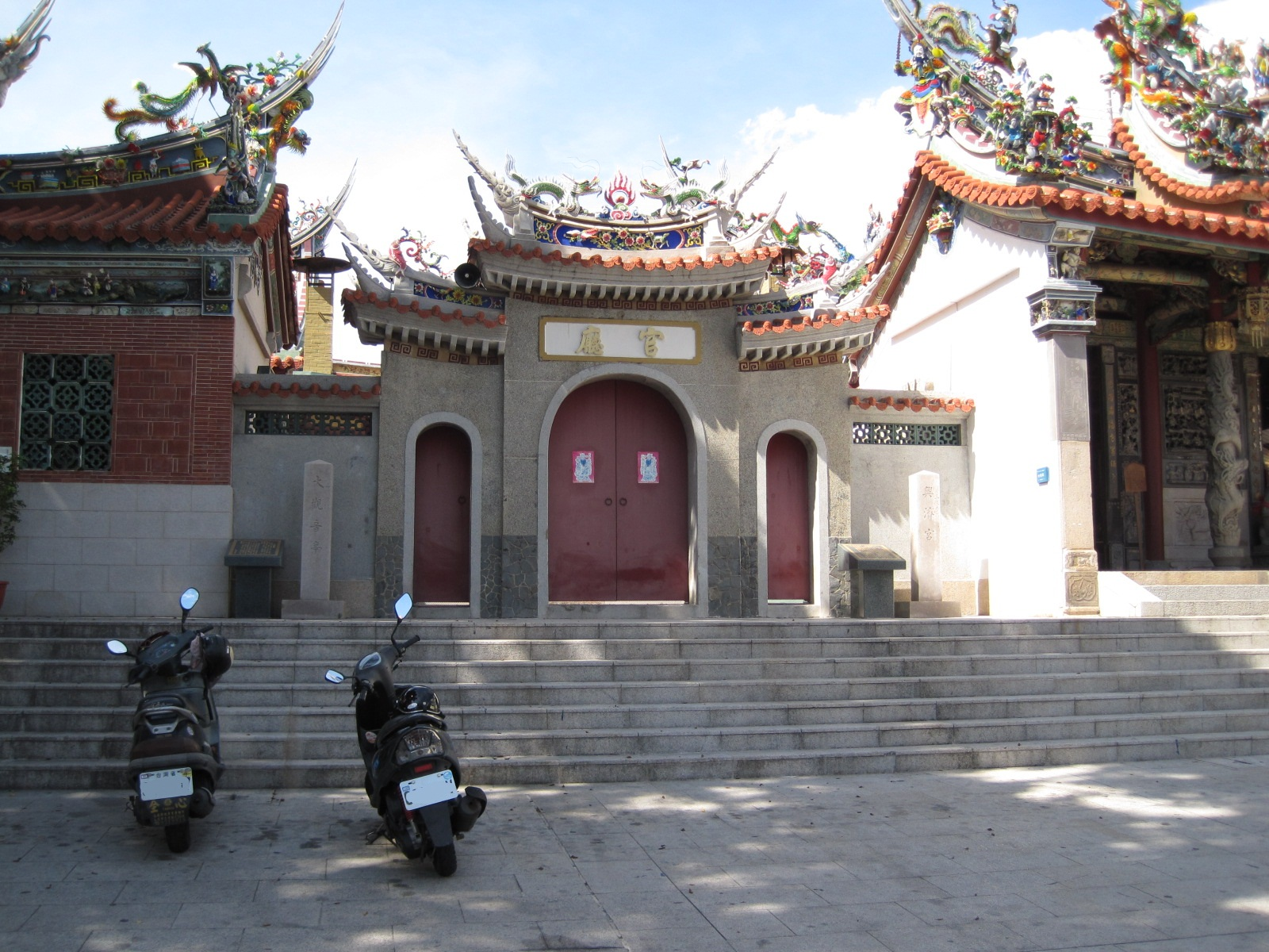 大觀音亭興濟宮官廳